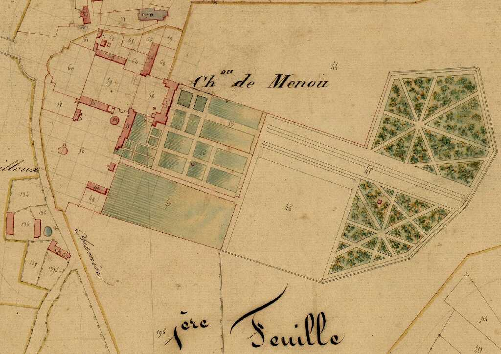 Lageplan des Schlosses Menou im 19. Jahrhundert